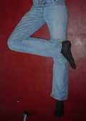 viererzeichen orthopaedie